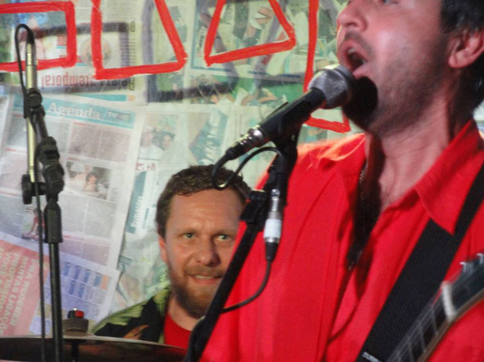 Graforréia Xilarmônica no bar Ocidente - Alexandre Birck e Carlo Pianta